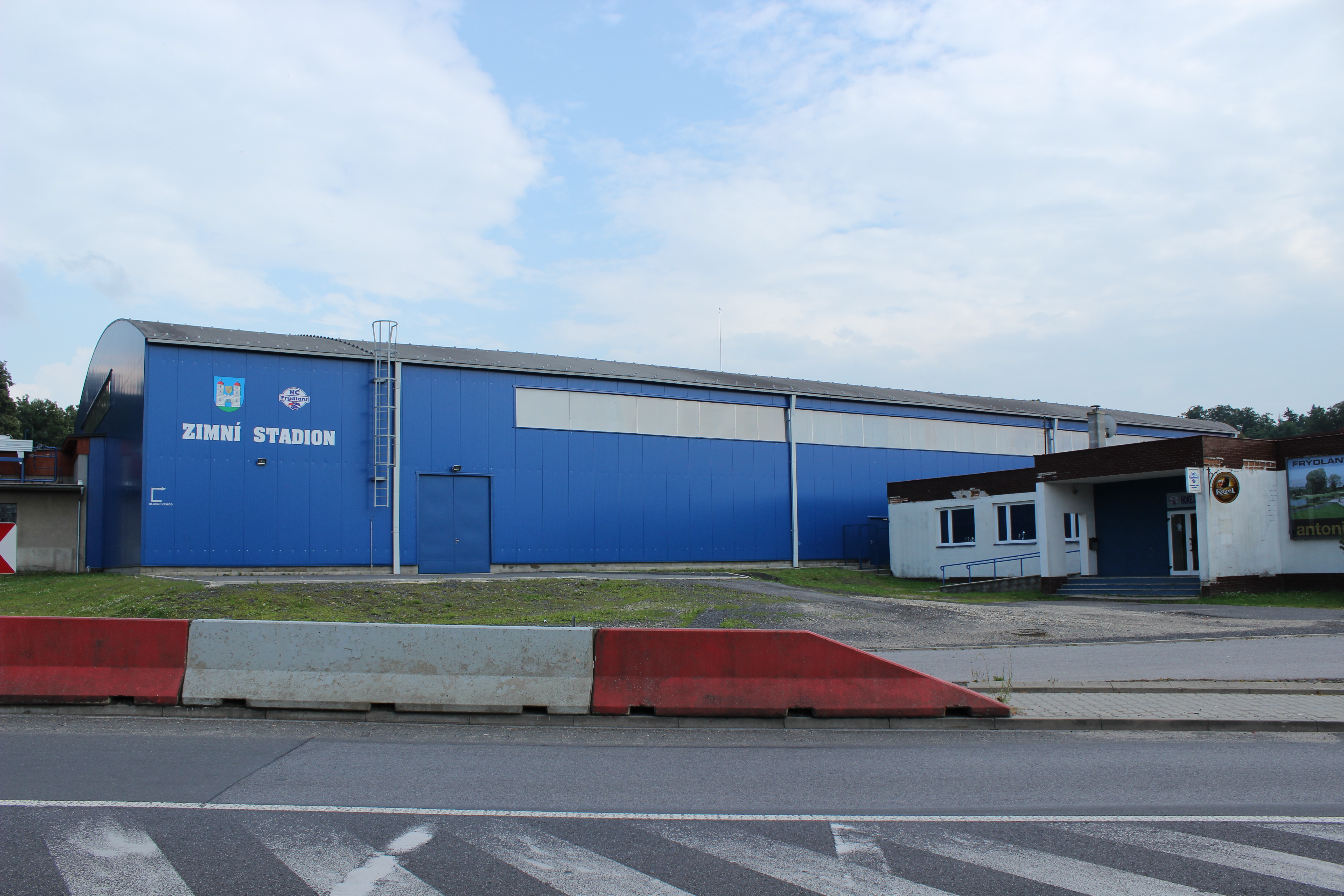 Zimní stadion ve Frýdlantě.